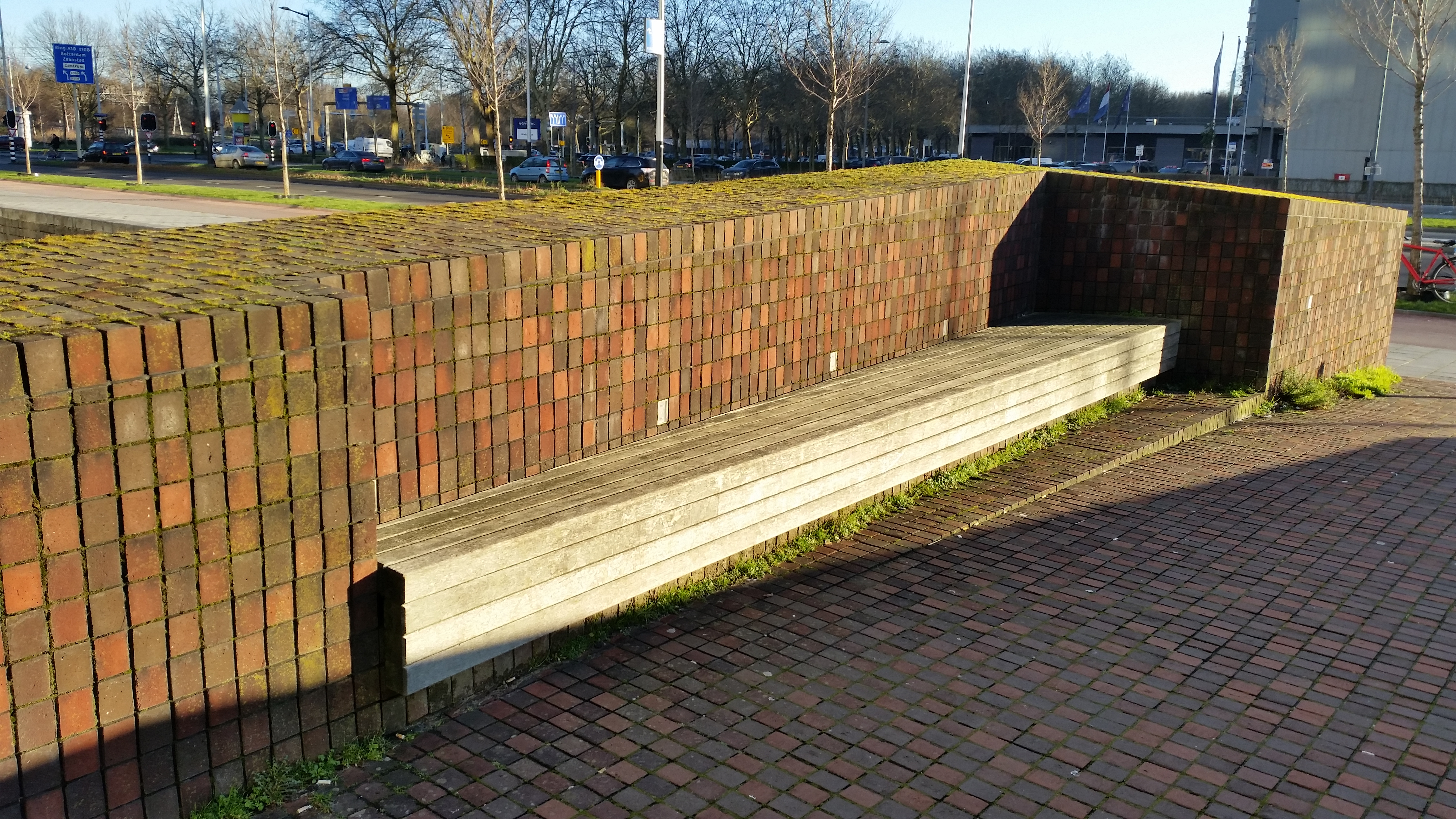 Zitje annex balkon van Brug 865 (in Amsterdam)